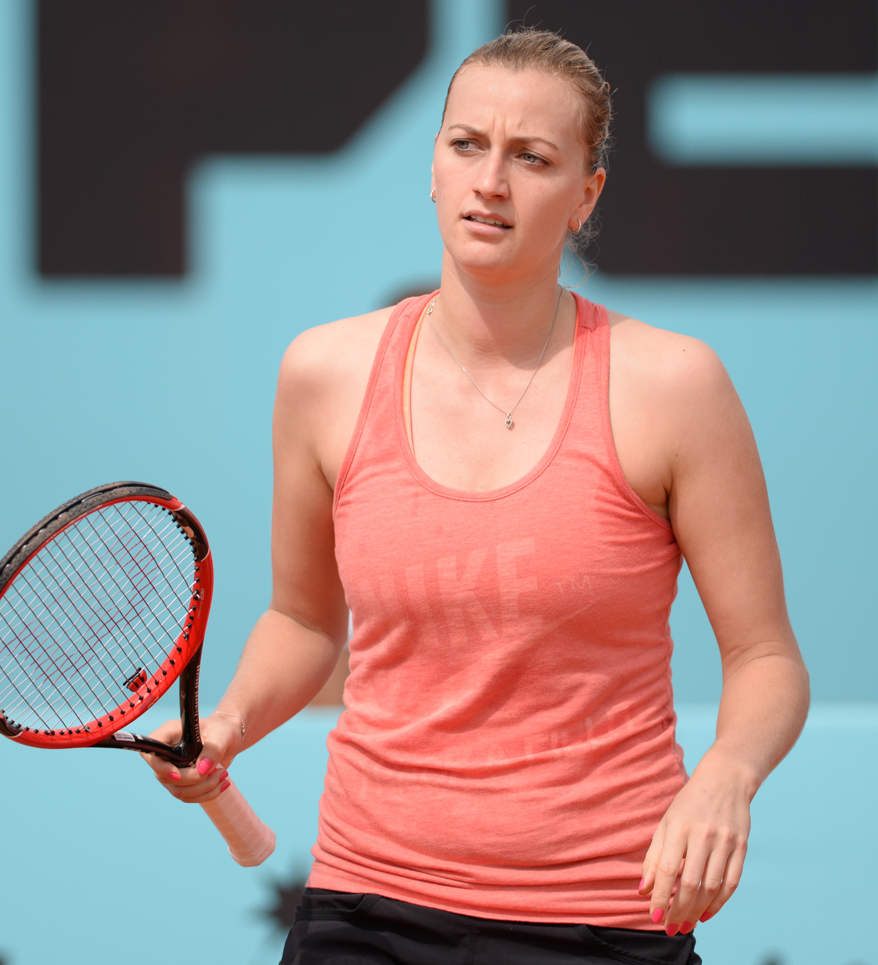 Petra Kvitova